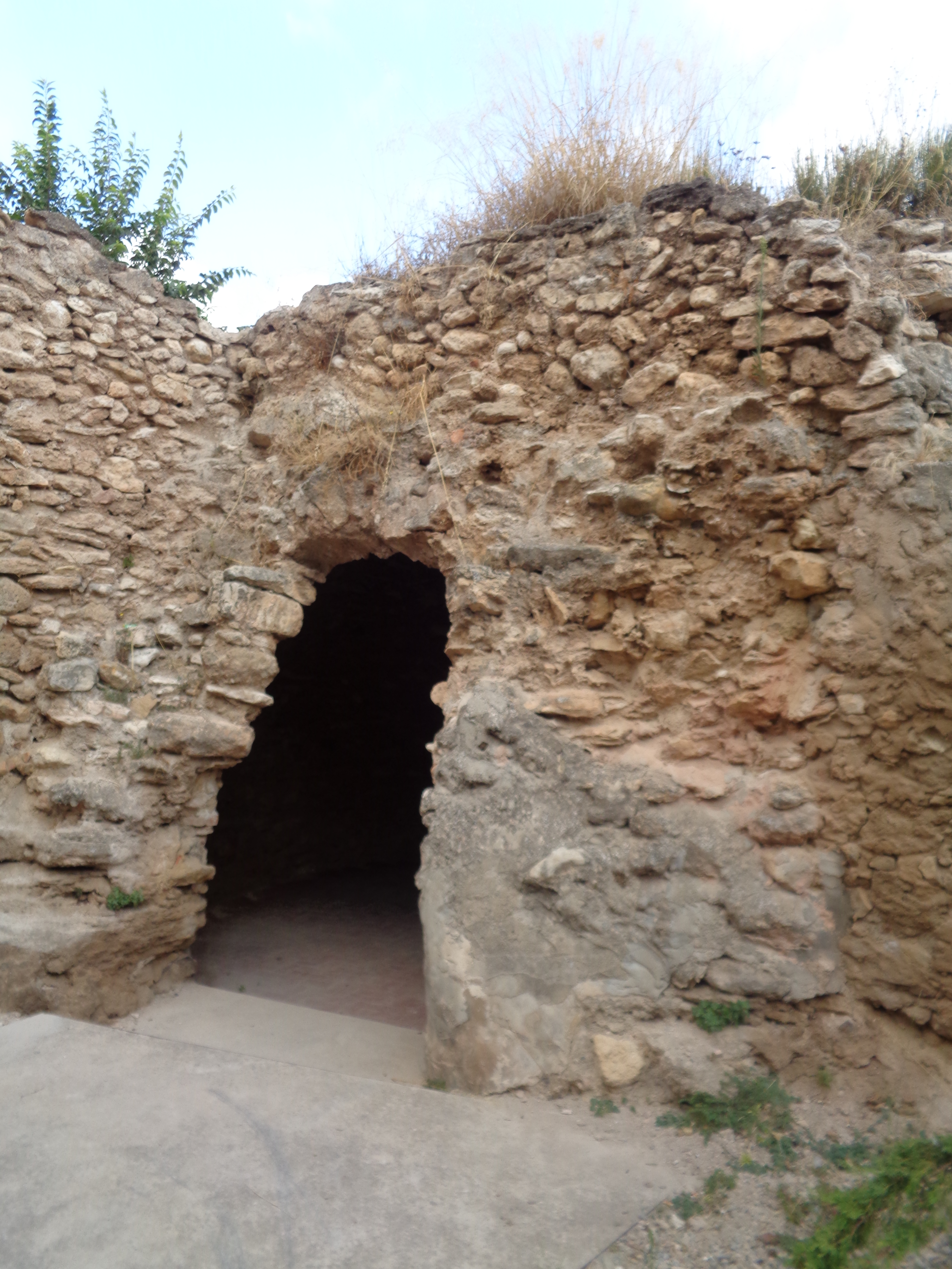 Iàtova.